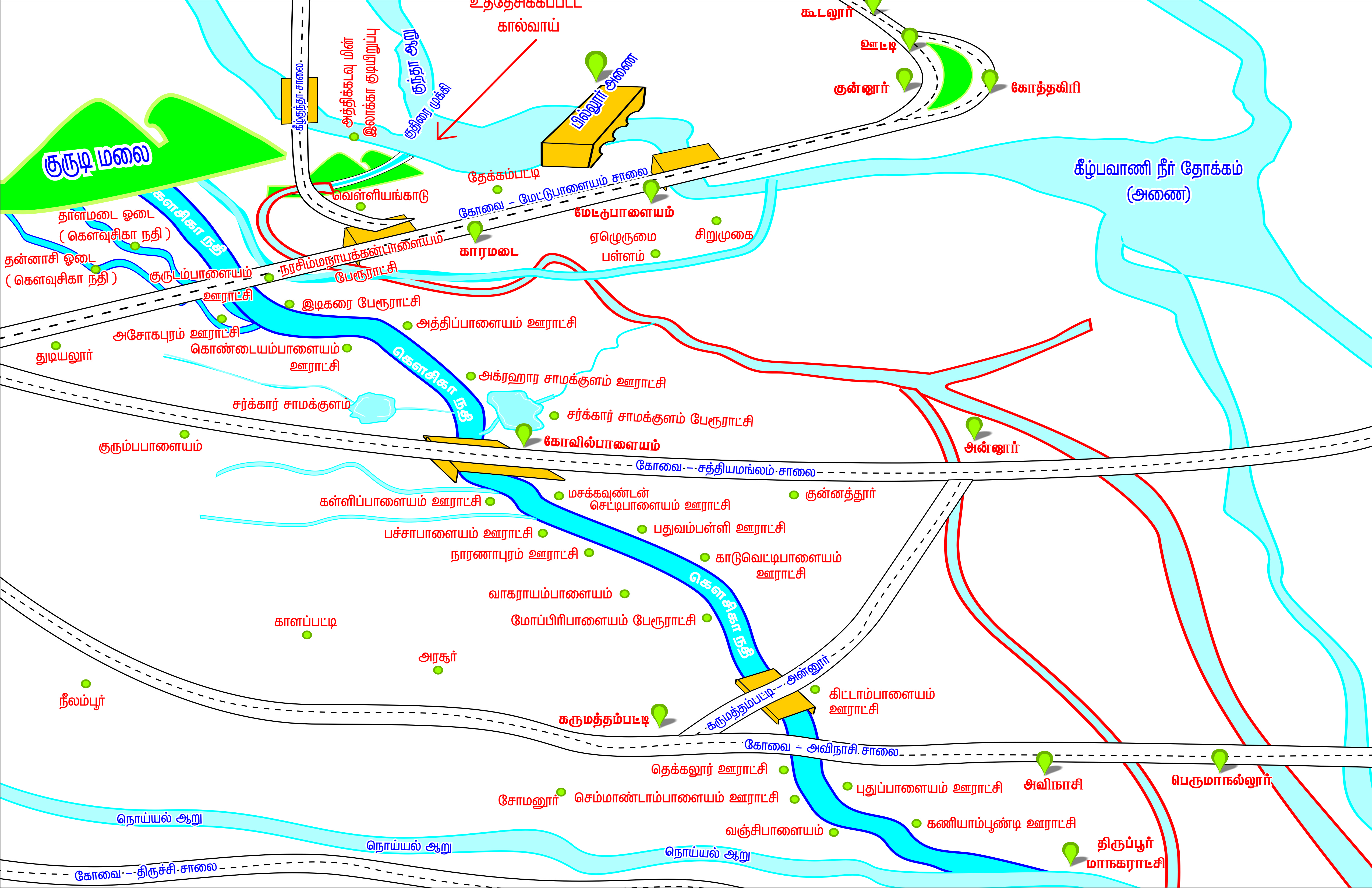 கவுசிகா நதி நீர் வழி பாதை.